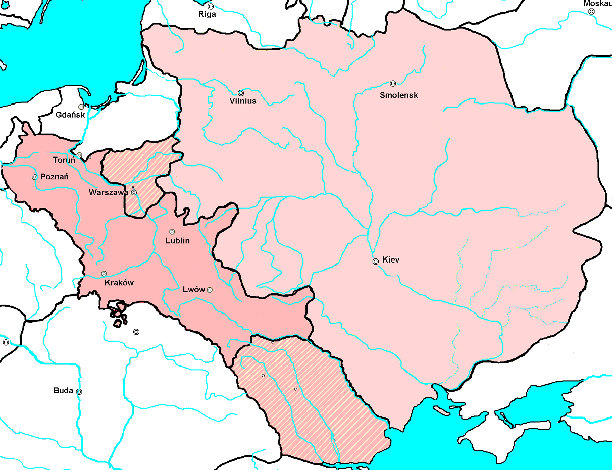 Jagiellon_countries_1490